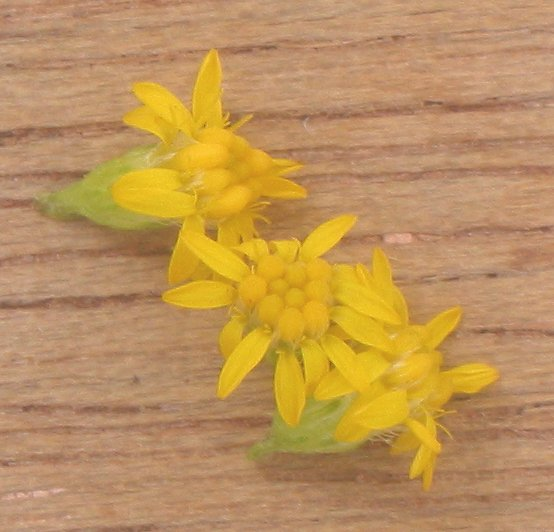 (nl: Late guldenroede hoofdje Solidago gigantea